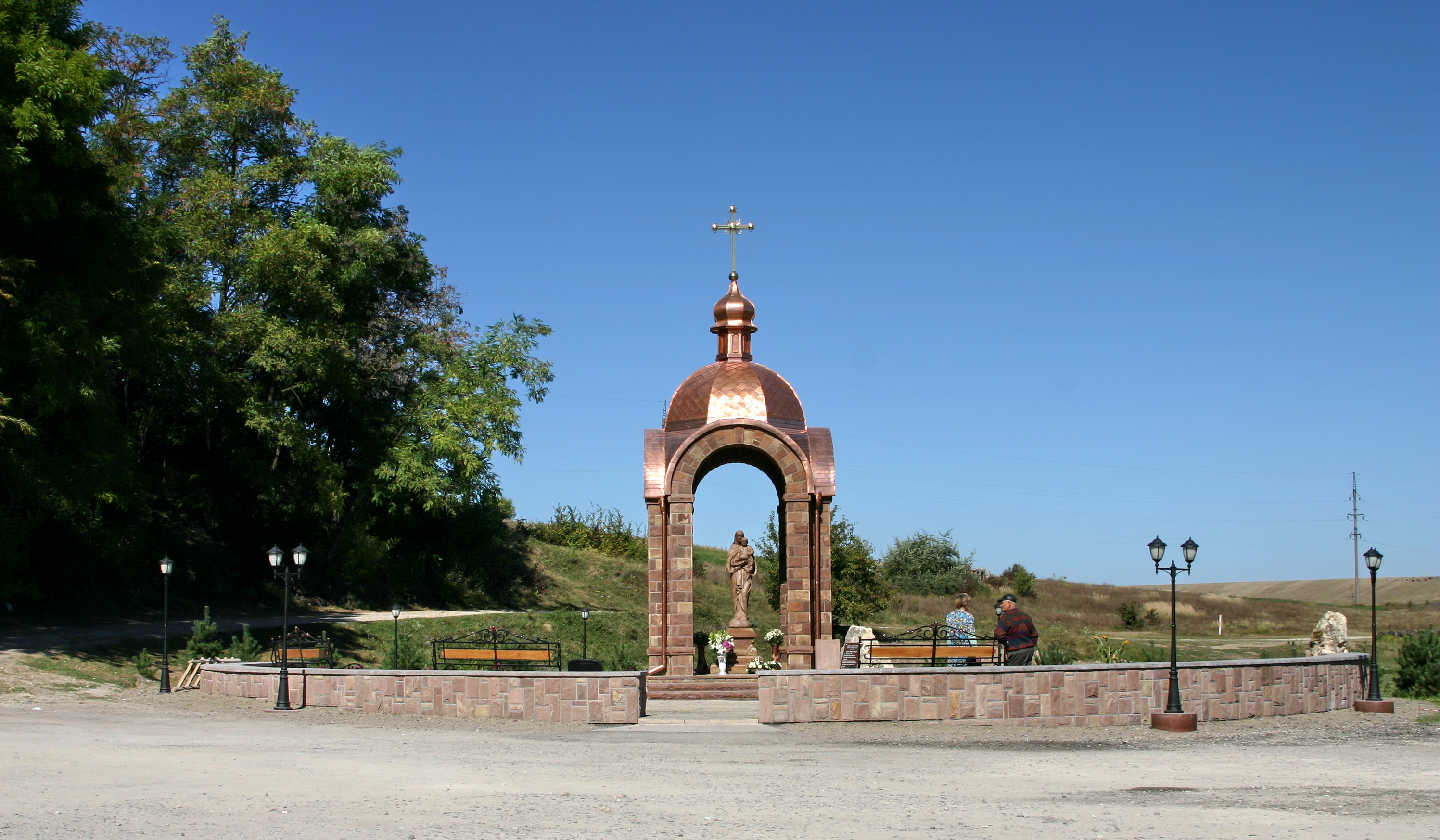 Stupky-dzherelo.jpg